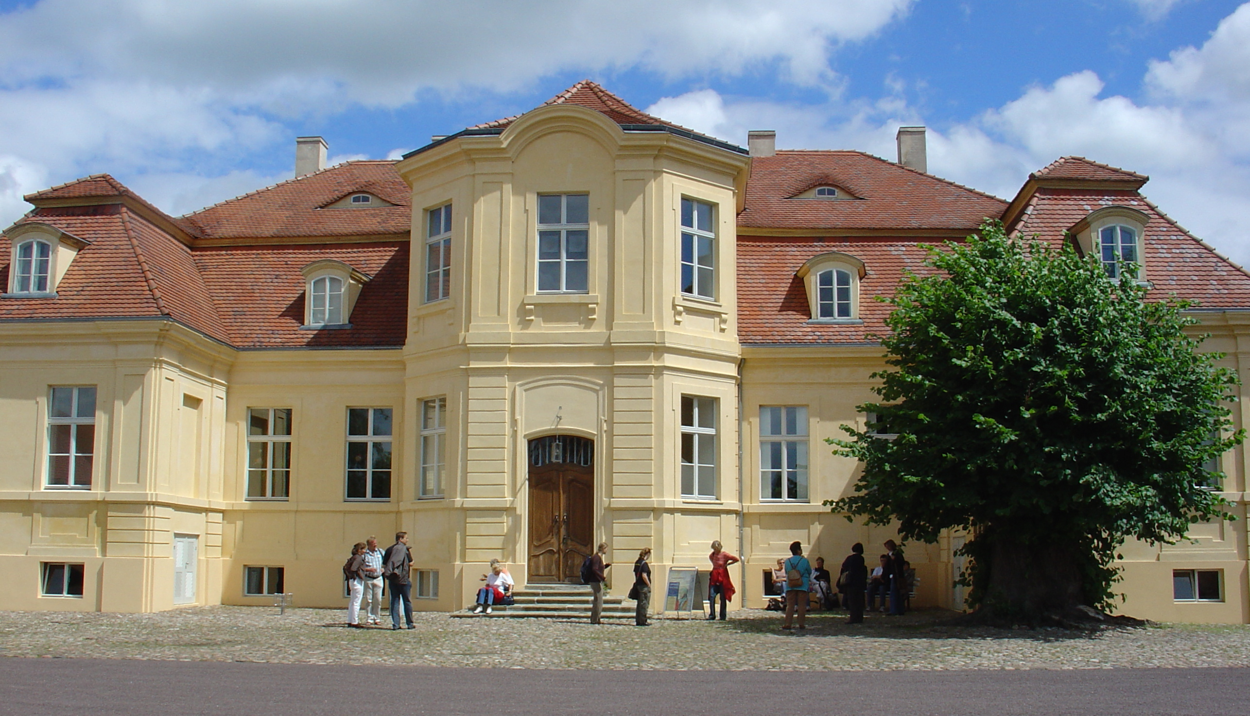 Schloss Reckahn (Brandenburg) / Reckahn Manor (Brandenburg, Germany)